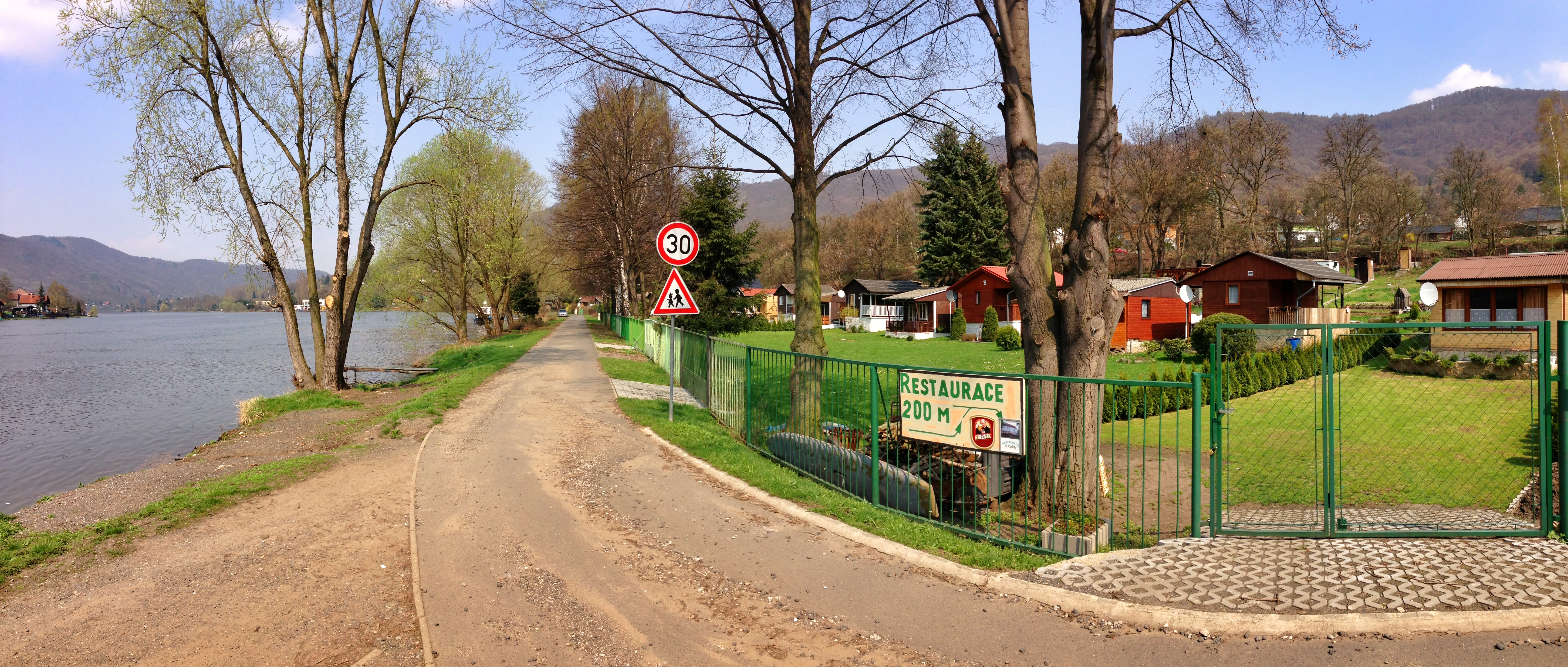 Cyklotrasa Labská stezka a chatová kolonie v Brné nad Labem.